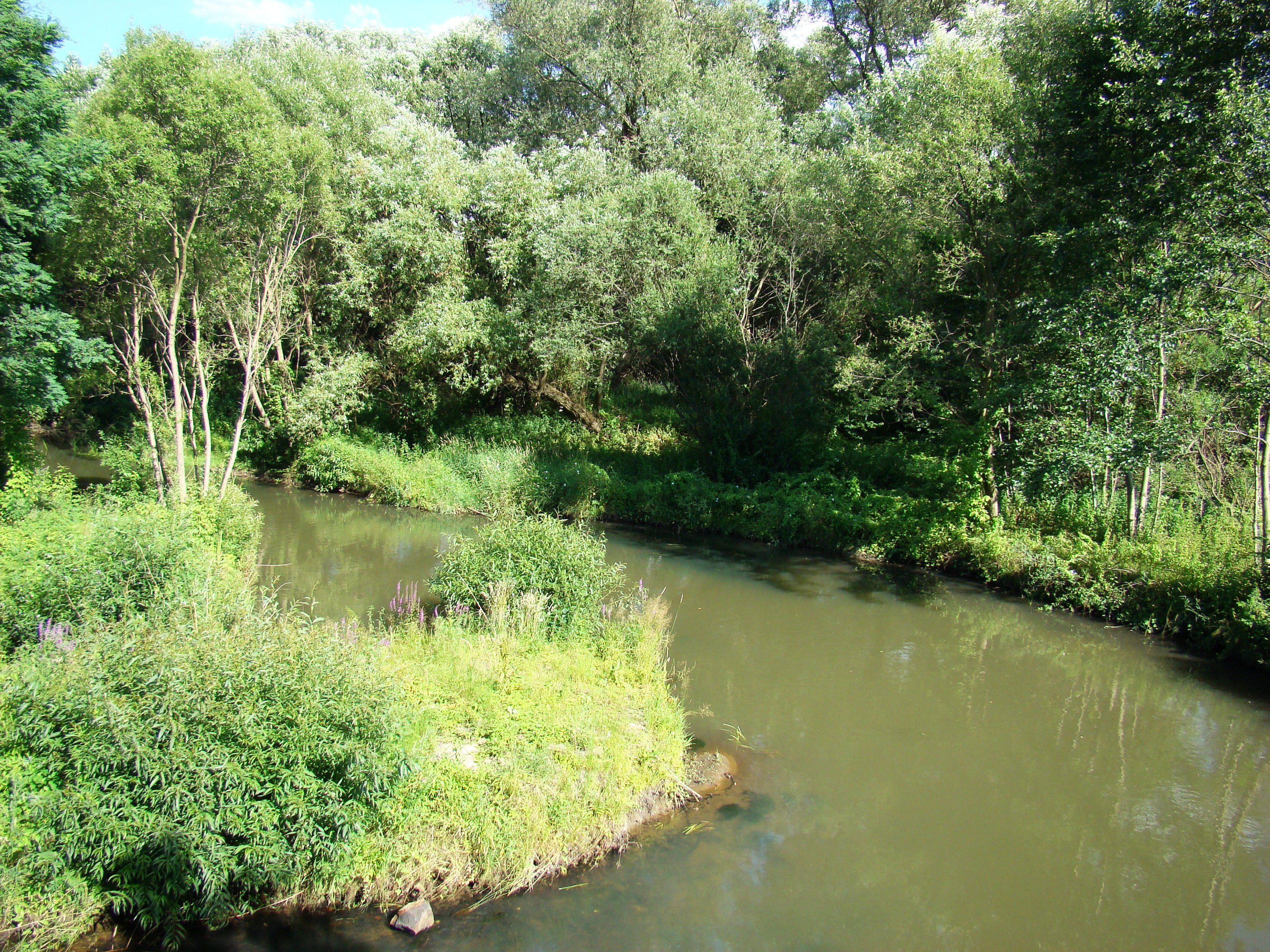 Rzeka Warta w okolicy Poraja.